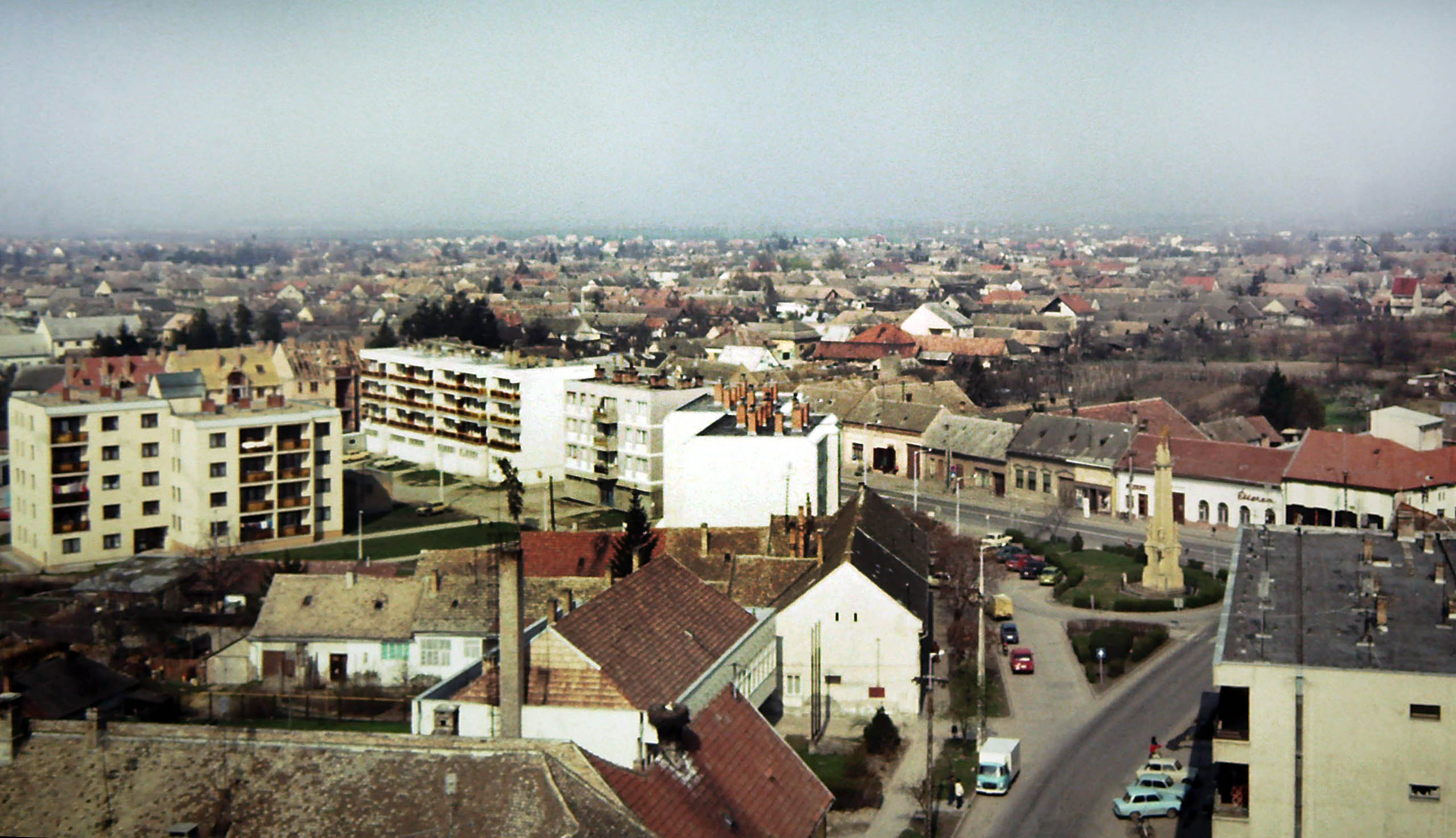 Blick vom Kirchturm auf Tolna